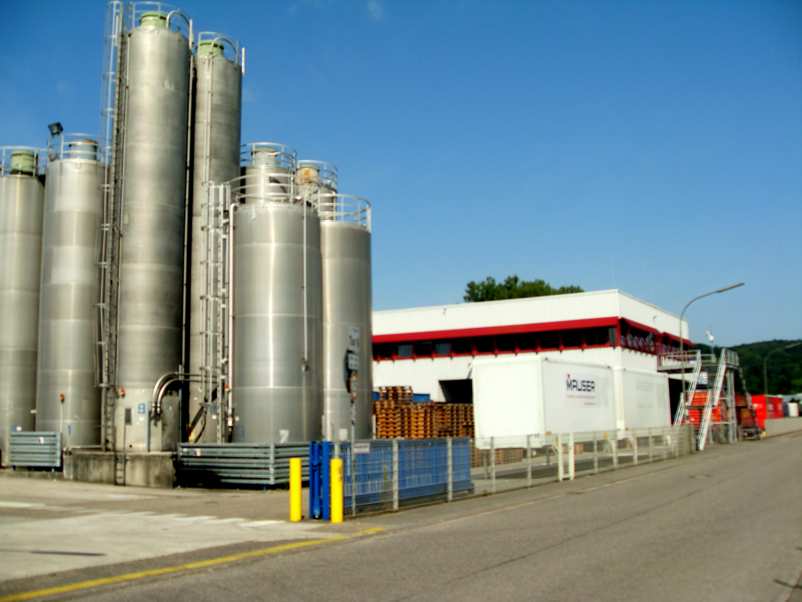 Fabryka Mauser w Bammental